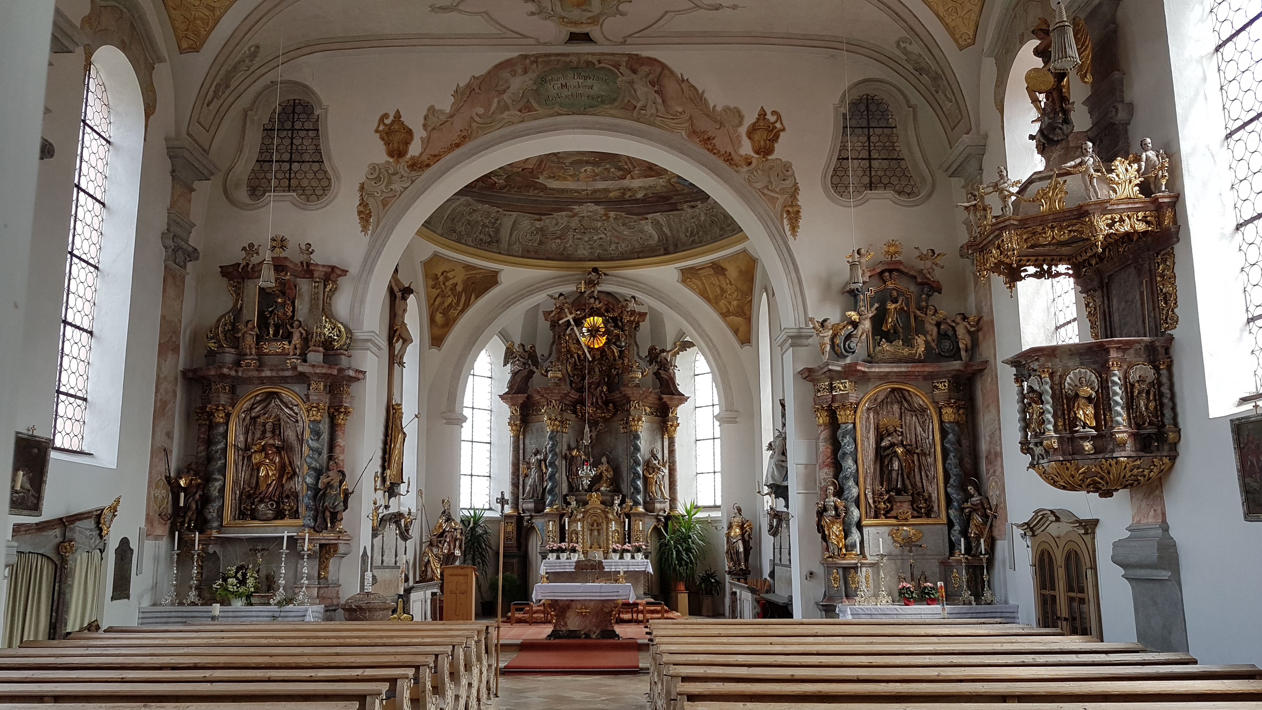 Burggen, Pfarrkirche St. Stephan